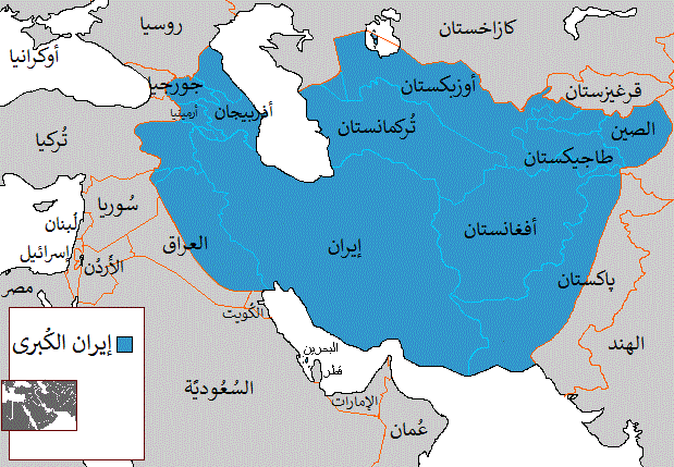 خارطة تُظهر إيران الكُبرى وفق بعض القوميين الفُرس.